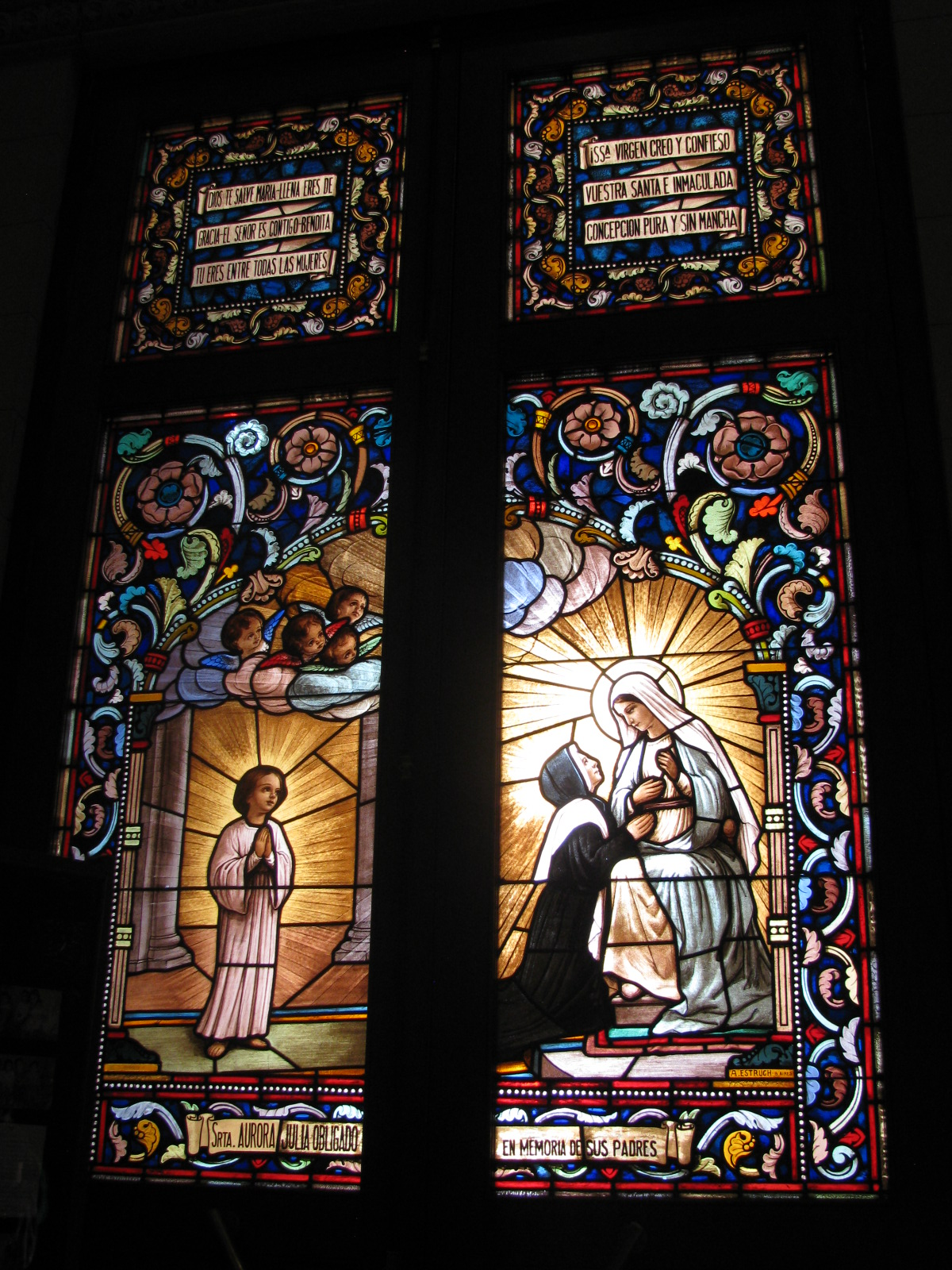 La Anunciación del Ángel a la Virgen María.